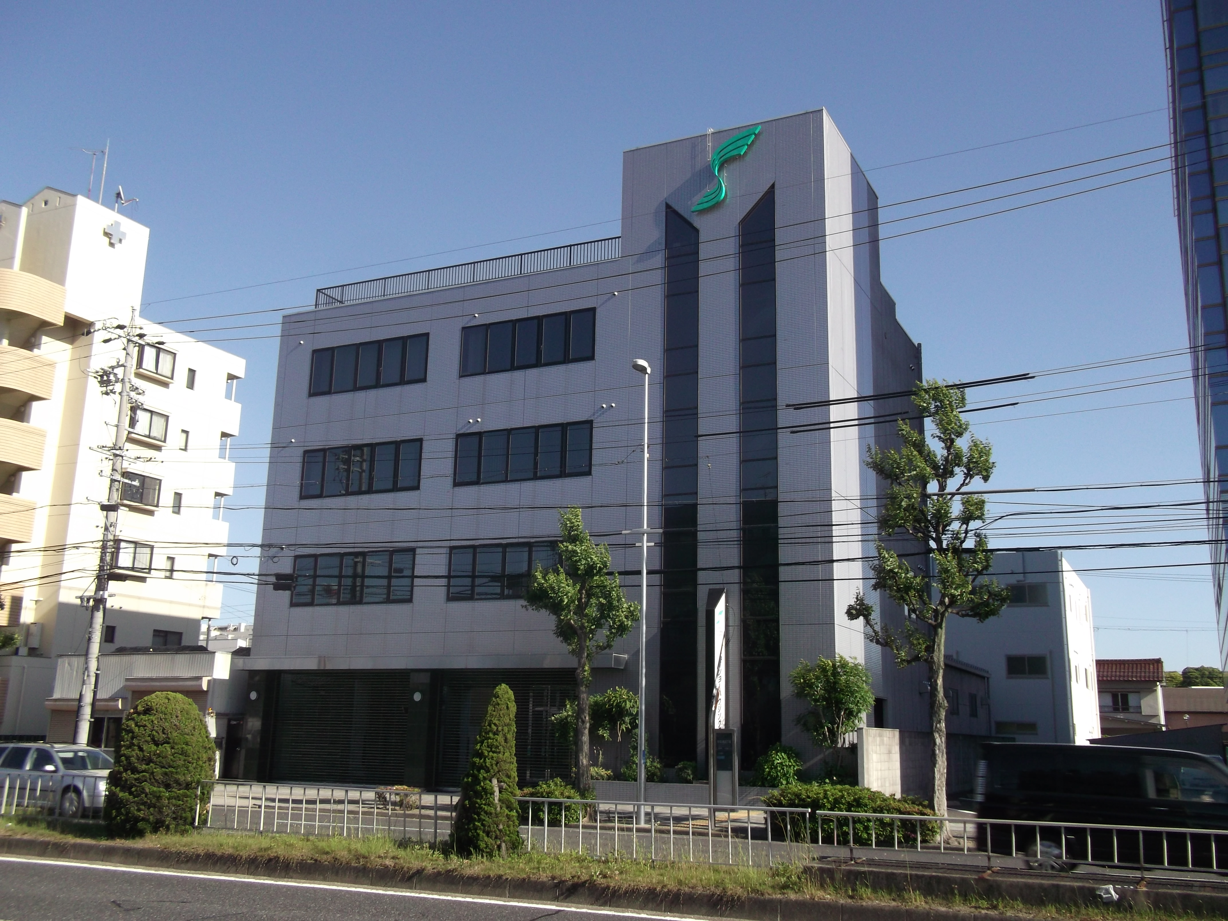 名古屋市瑞穂区妙音通のサンヨーハウジング名古屋本社を北側公道から写す